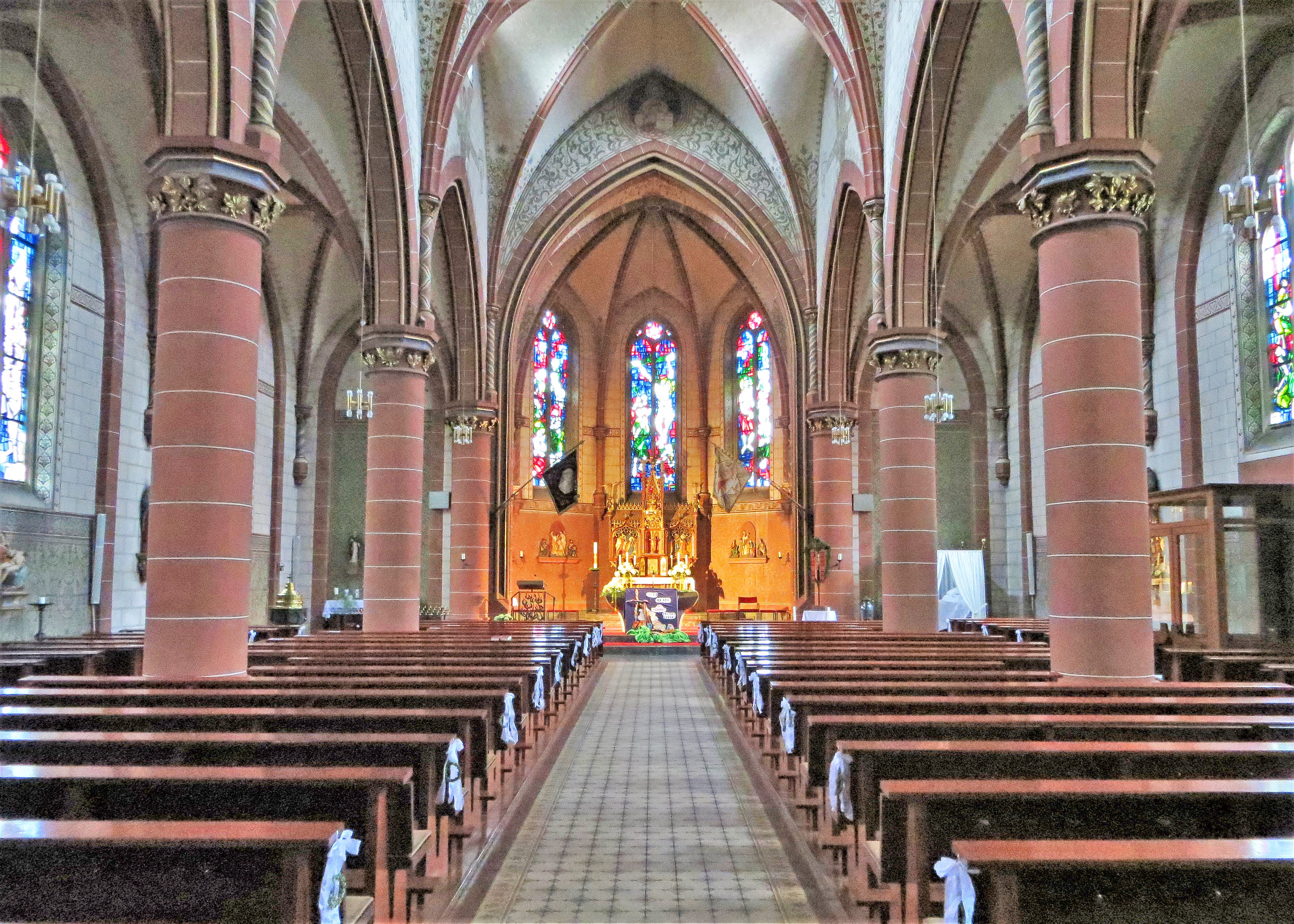 Blick ins Innere der katholischen Pfarrkirche St. Petrus in Ketten in Hilbringen, einem Stadtteil von Merzig, Landkreis Merzig-Wadern, Saarland.